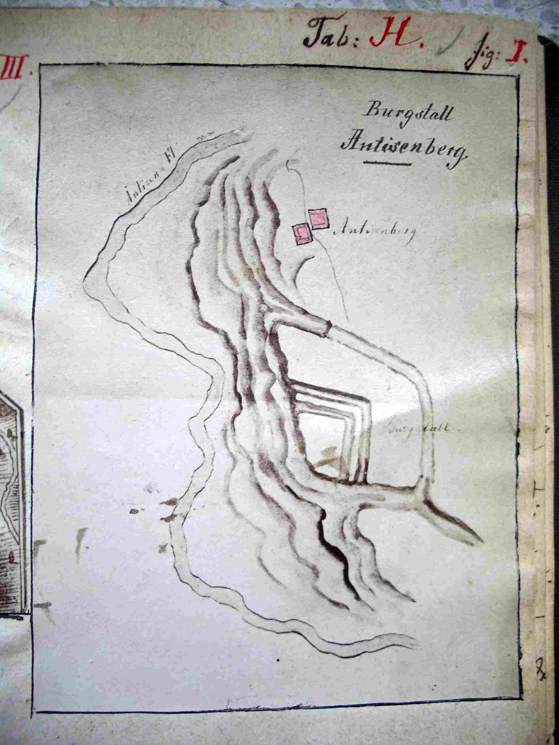 Planskizze (Tab. H, Fig. 1) des Burgstalls Antiesenberg von Johann Ev. Lamprecht